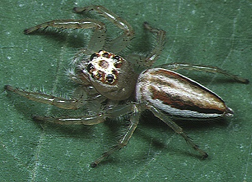 female Telamonia vlijmi from Okinawa.